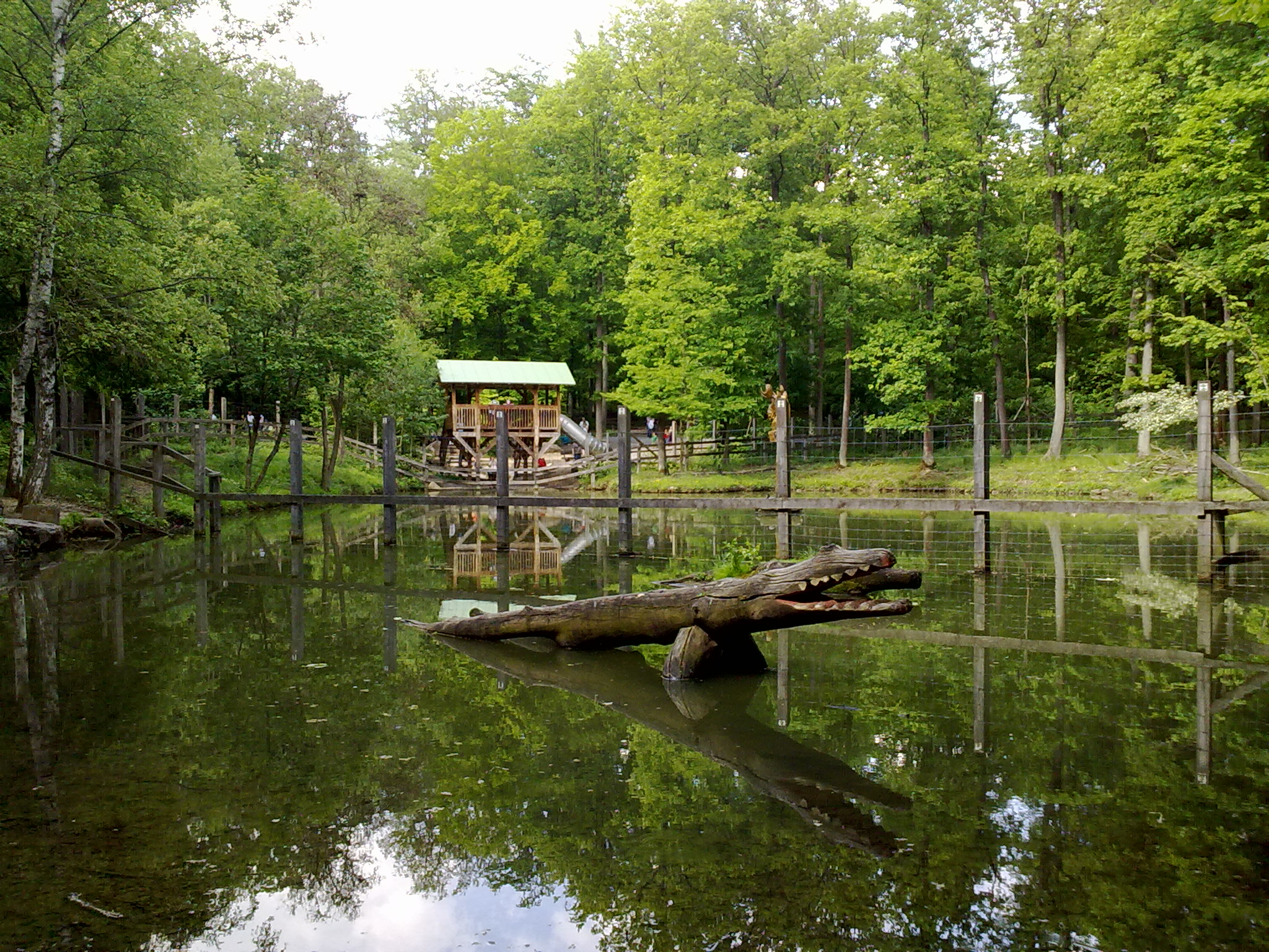 Ententeich